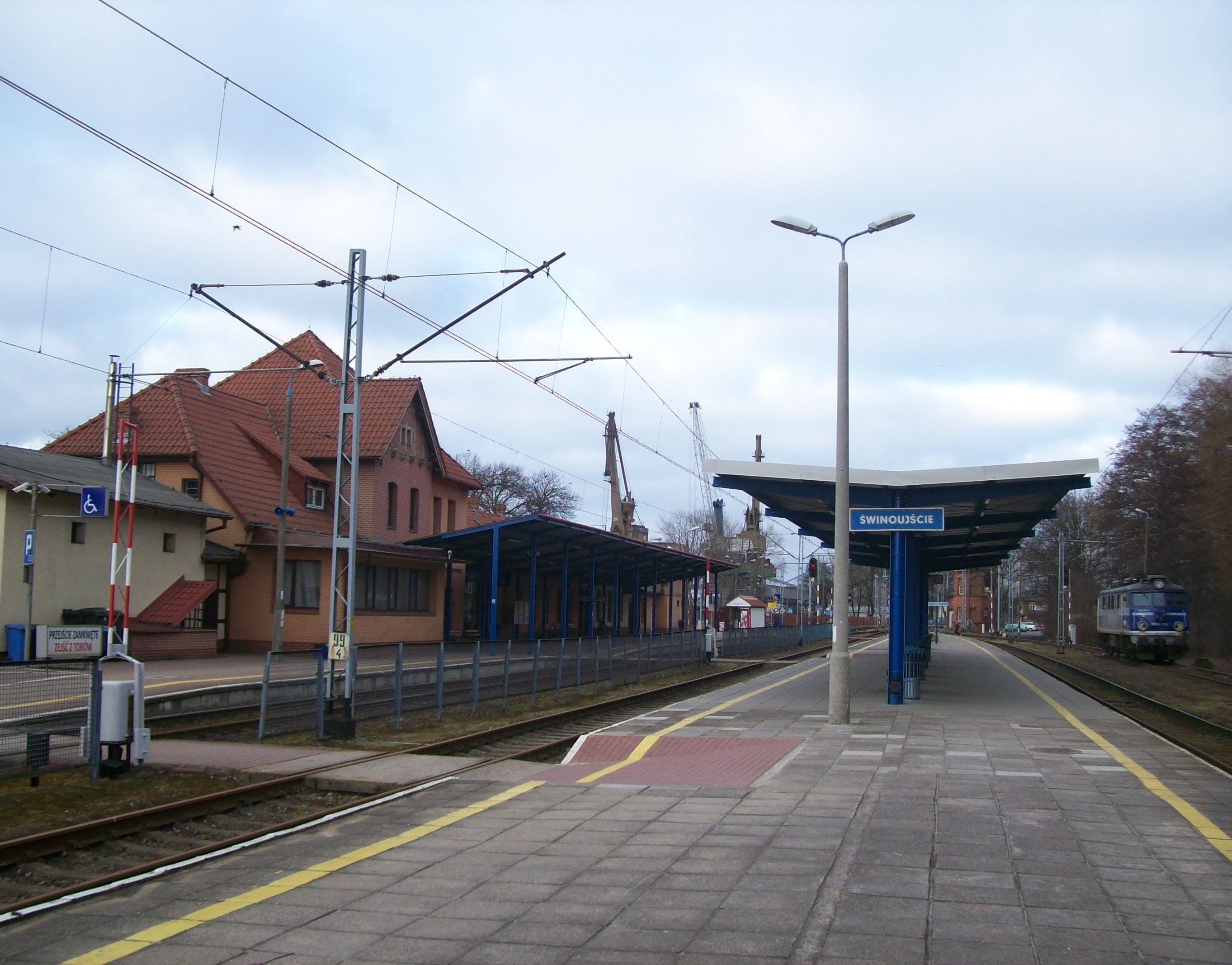 Widok na budynek stacji oraz perony świnoujskiego dworca.